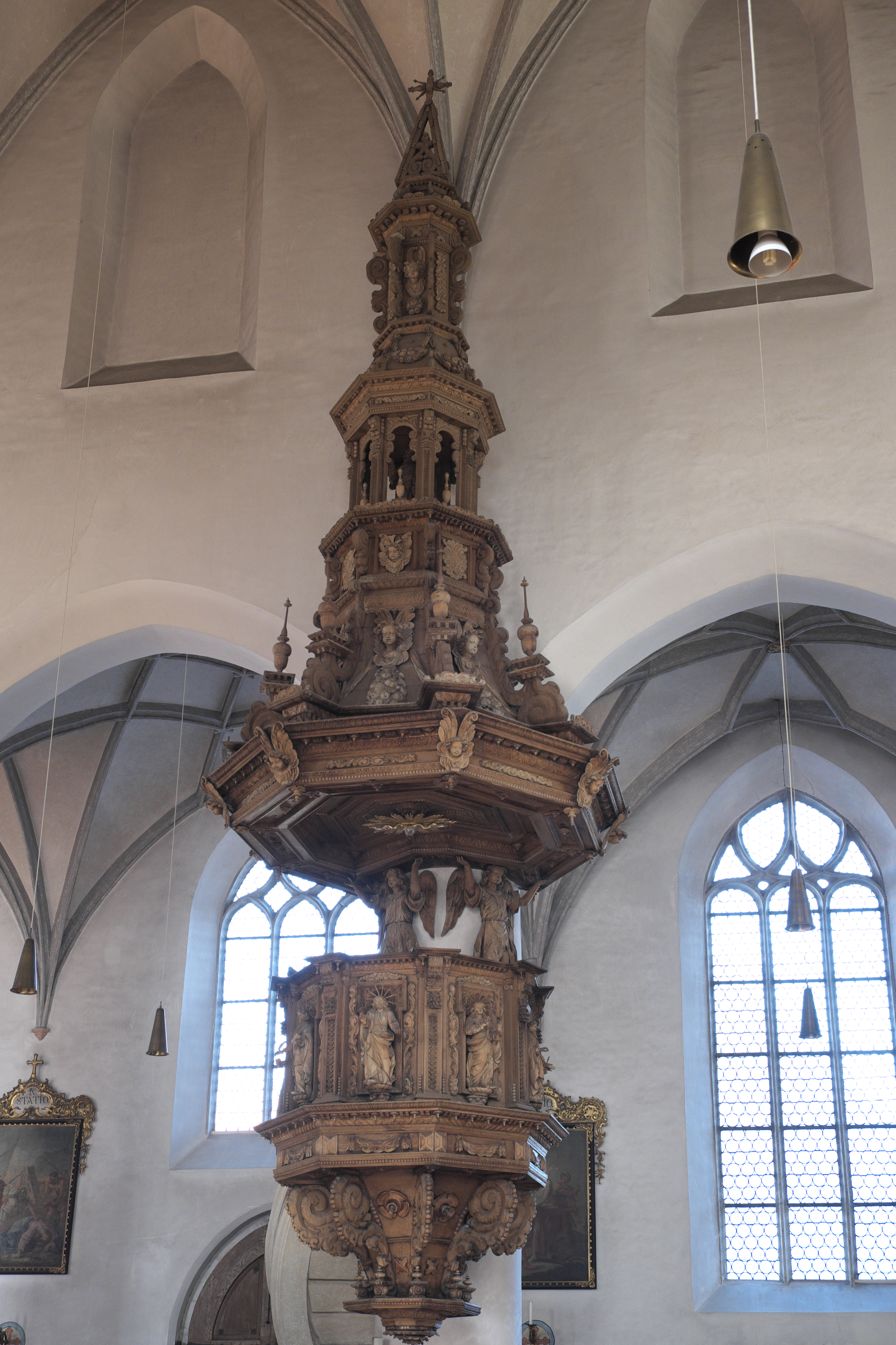 Katholische Stadtpfarrkirche Mariä Himmelfahrt in Höchstädt im Landkreis Dillingen an der Donau (Bayern), Kanzel aus Eichen- und Lindenholz, um 1681, Johann Baptist Libigo zugeschrieben